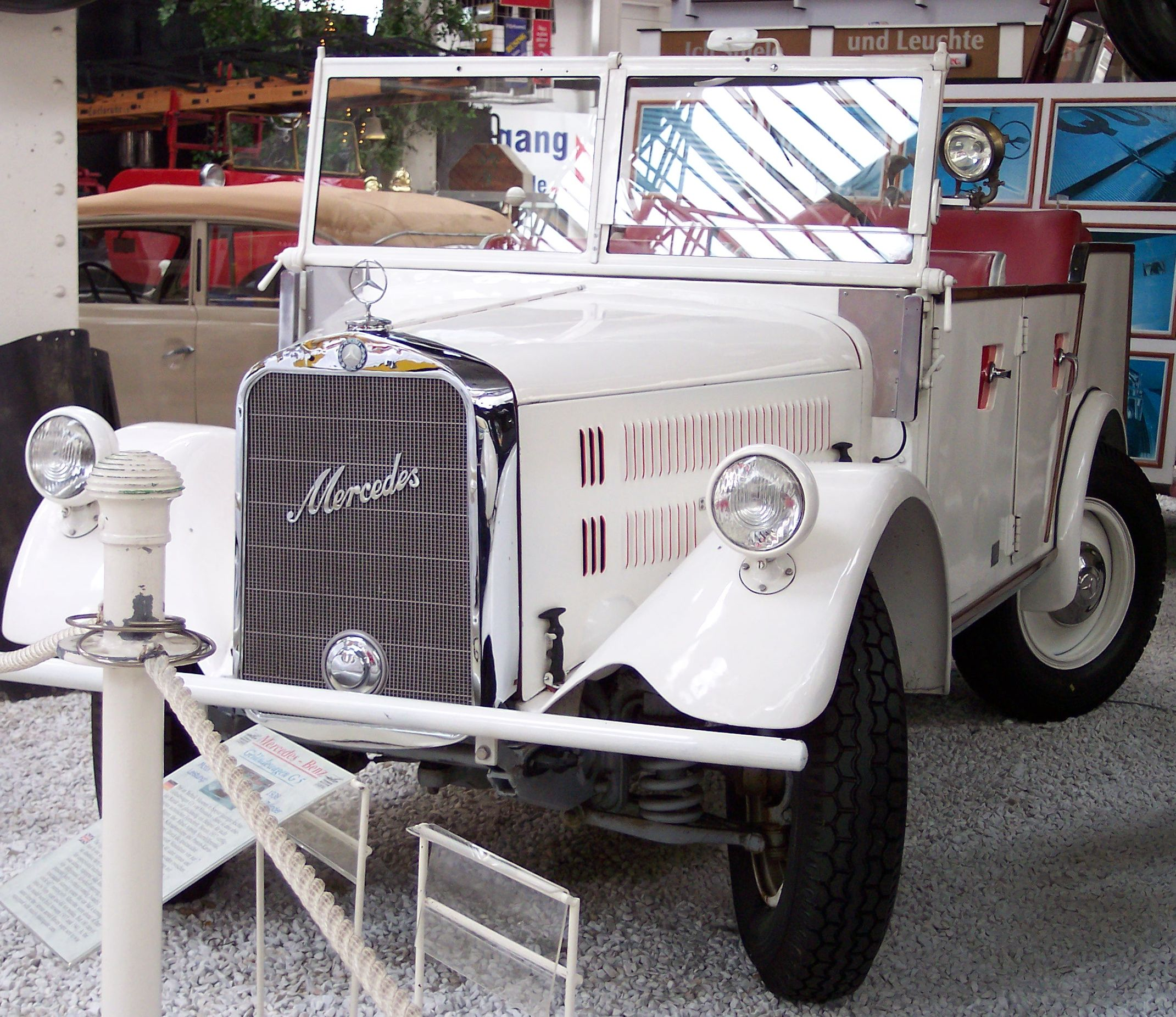 Mercedes-„Kübelwagen“ G5 – Mercedes-Benz Typ G 5 (W 152, 1937–1941) – im Technik Museum Speyer